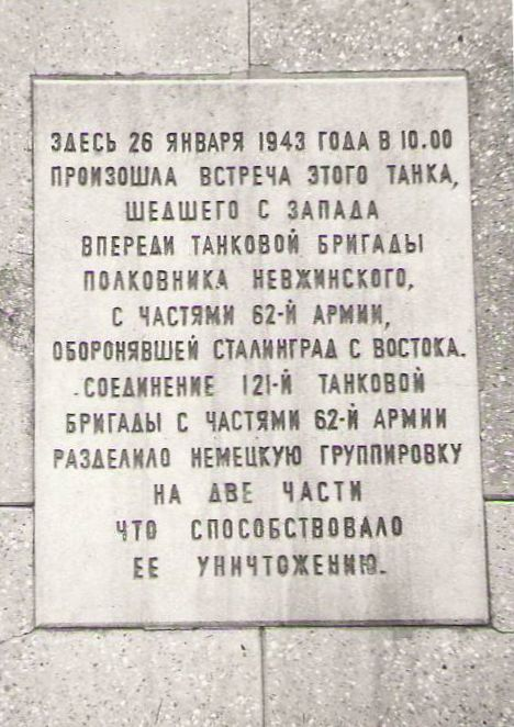 Памятная доска размещённая постаменте танка Т-34 № 18 «Челябинский колхозник» — памятник в Волгограде установленный в честь завершения операции «Кольцо». Памятник является частью Мемориального комплекса «Героям Сталинградской битвы» на Мамаевом кургане.